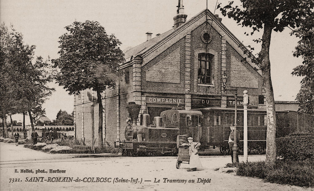 Tramway de Saint-Romain-de-Colbosc (Locomotives Corpet Louvet).